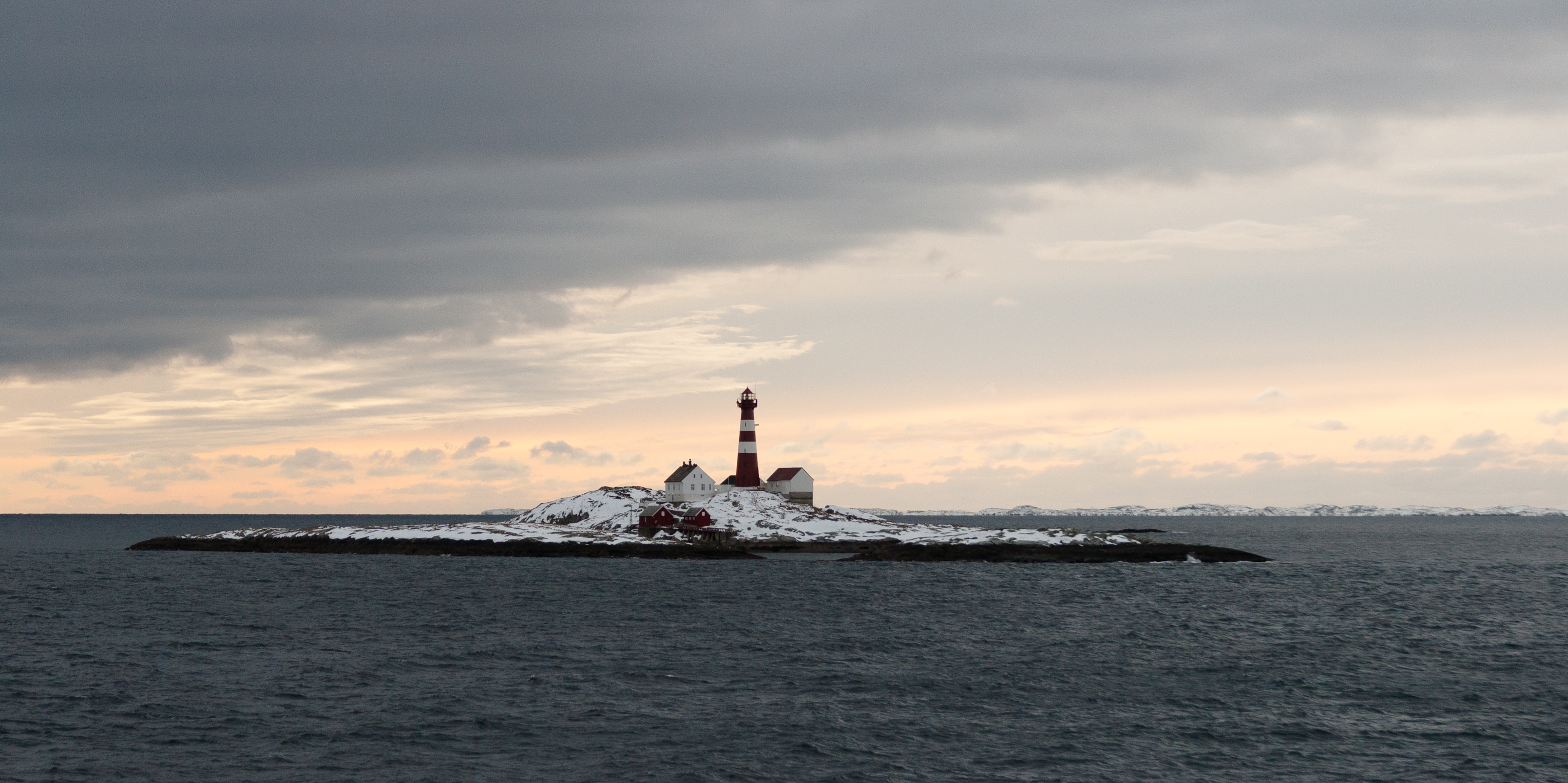 Phare de Landegode